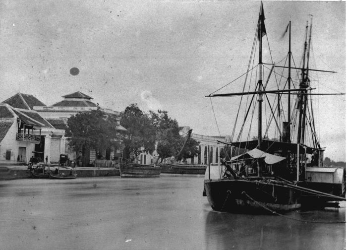 Foto. Rivier in Surabaya